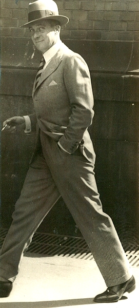 portrett, mann, skuespiller, filmregissør, gående helfigur.